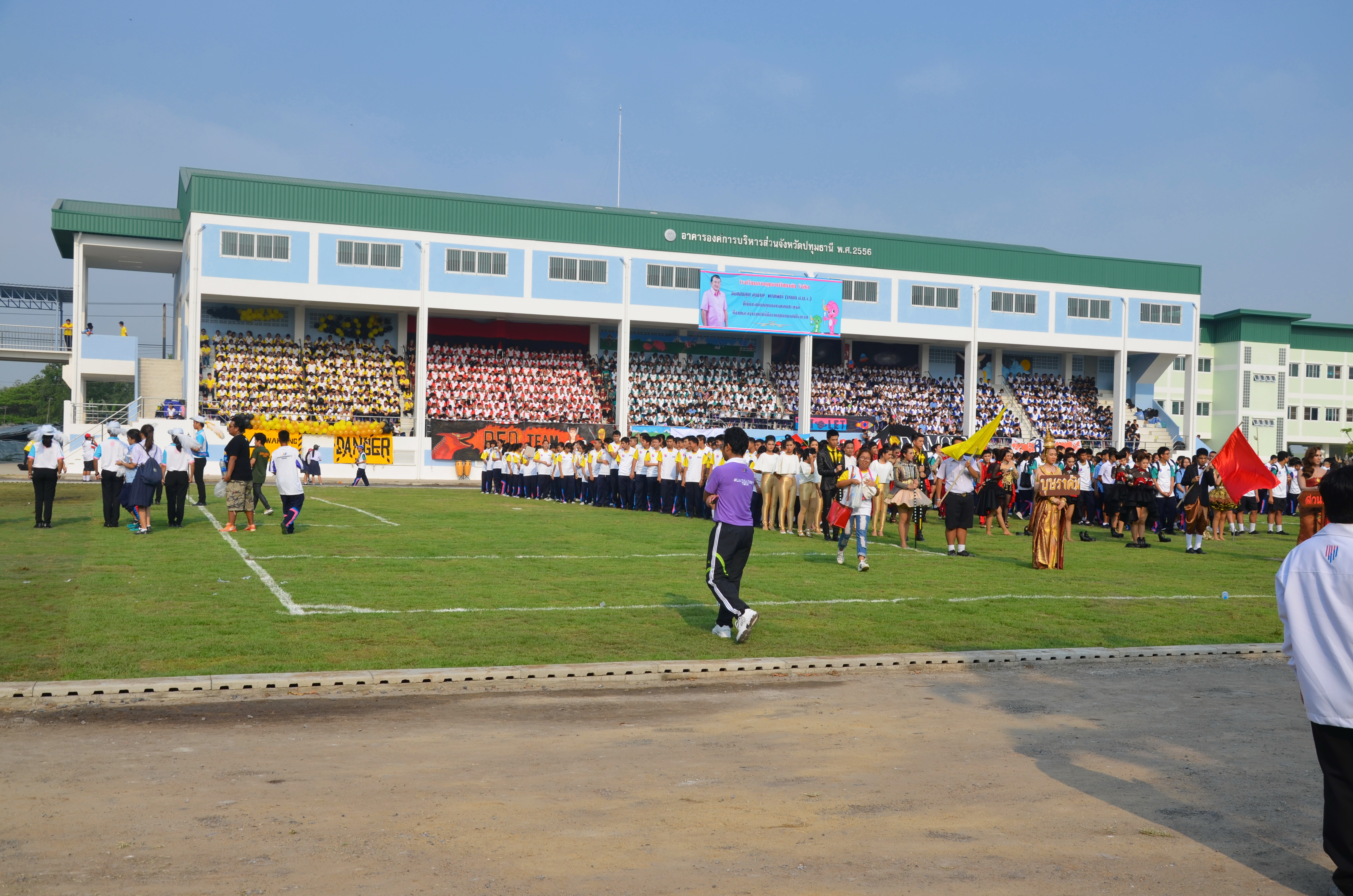 งานกีฬาสีภายใน สวนฯรังสิต เกมส์ 2557